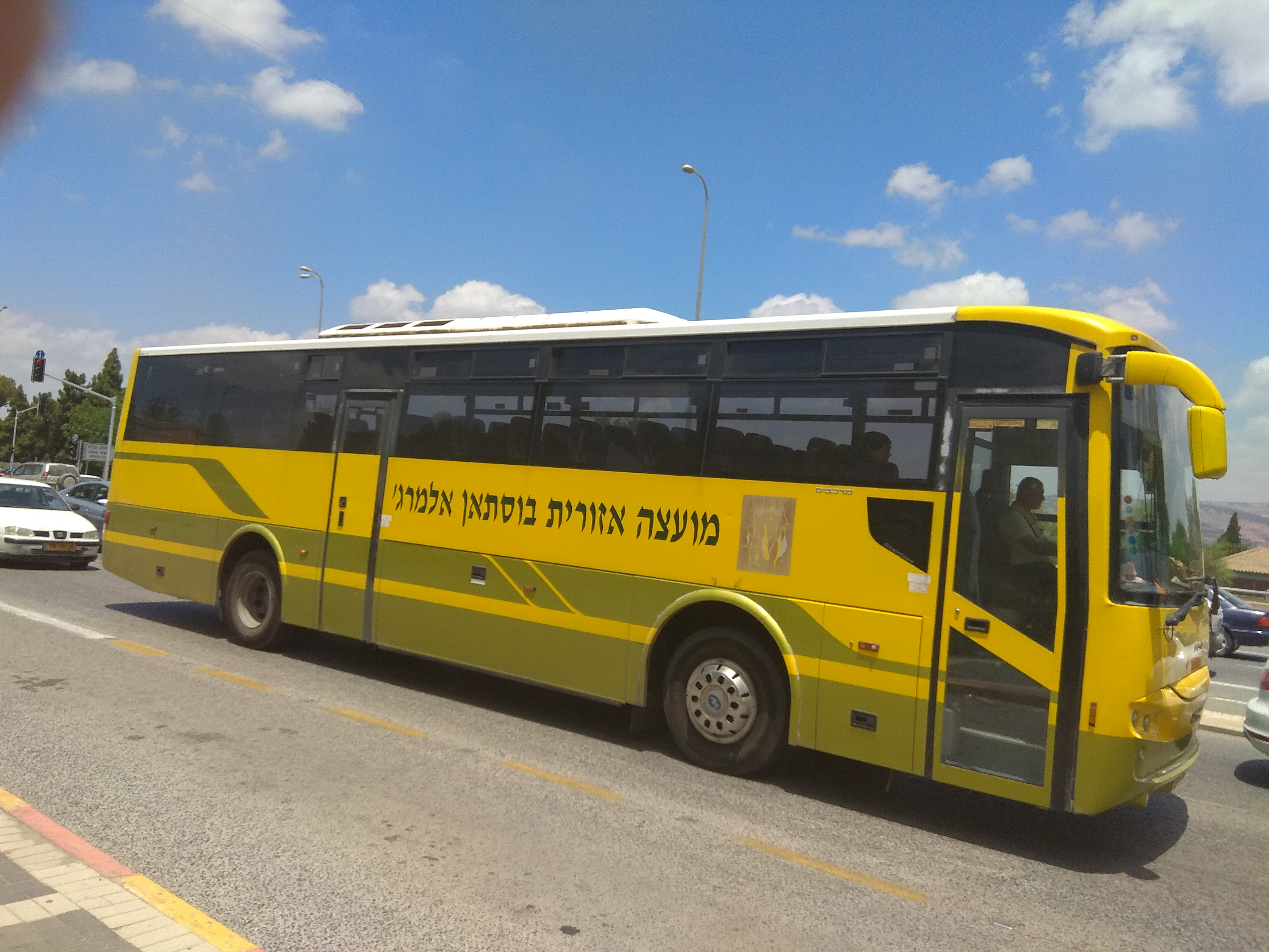 אוטובוס צהוב של המועצה האזורית